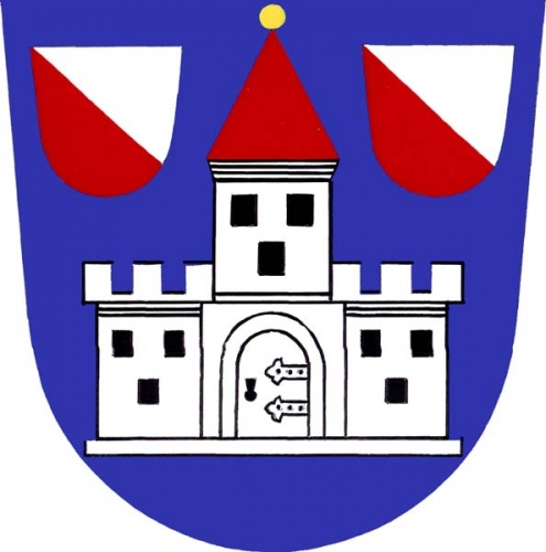 znak, Lukov, okres Znojmo